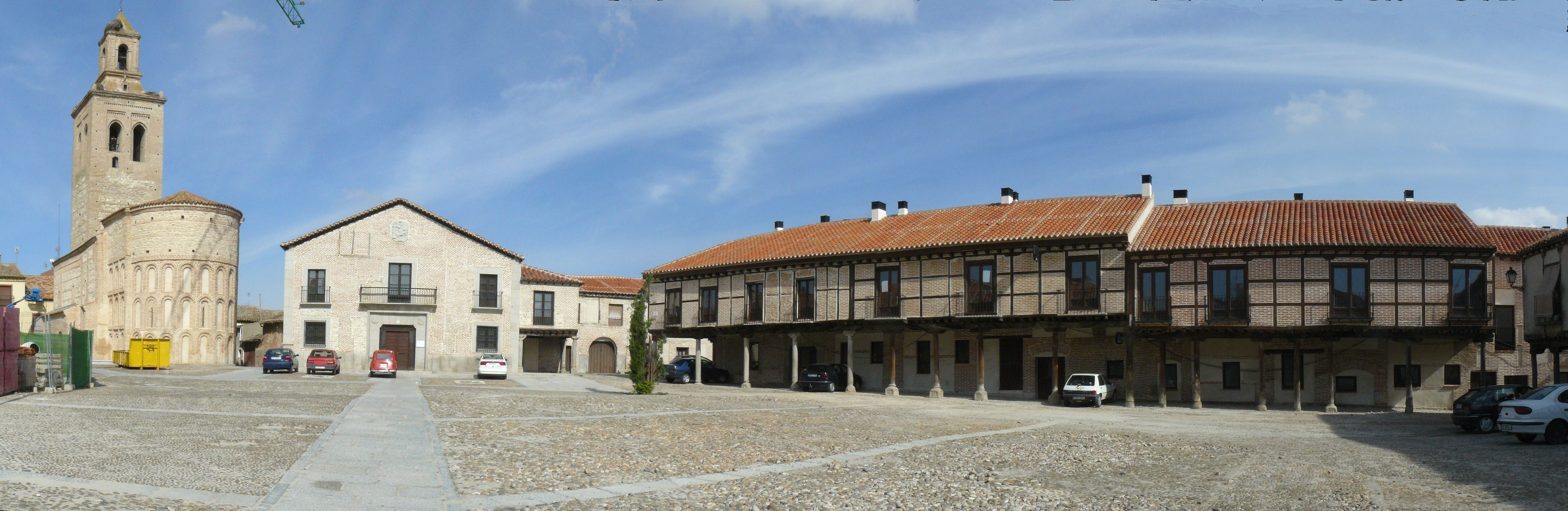 Imagen de la Plaza de la Villa, Arévalo, provincia de Ávila.